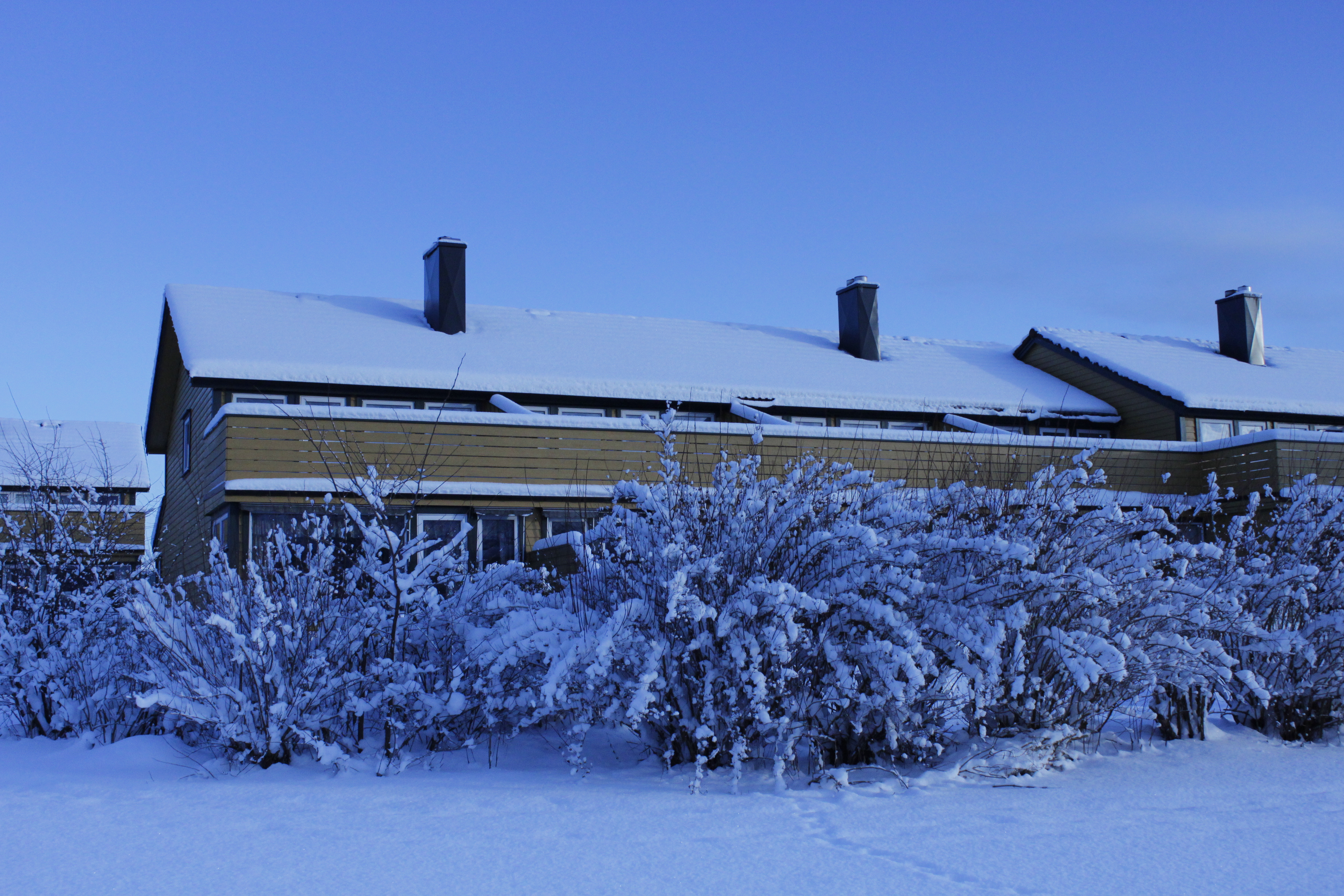 Rekkehusbebyggelse typisk for Bekkefaret